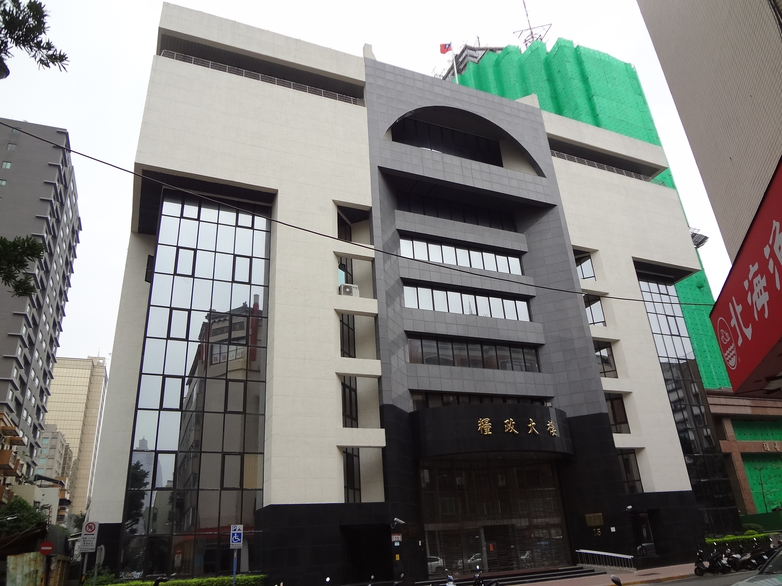 行政院農業委員會農糧署臺北辦公區、行政院農業委員會農業金融局、臺灣國家婦女館所在地：糧政大樓，位於臺北市中正區杭州南路一段15號。